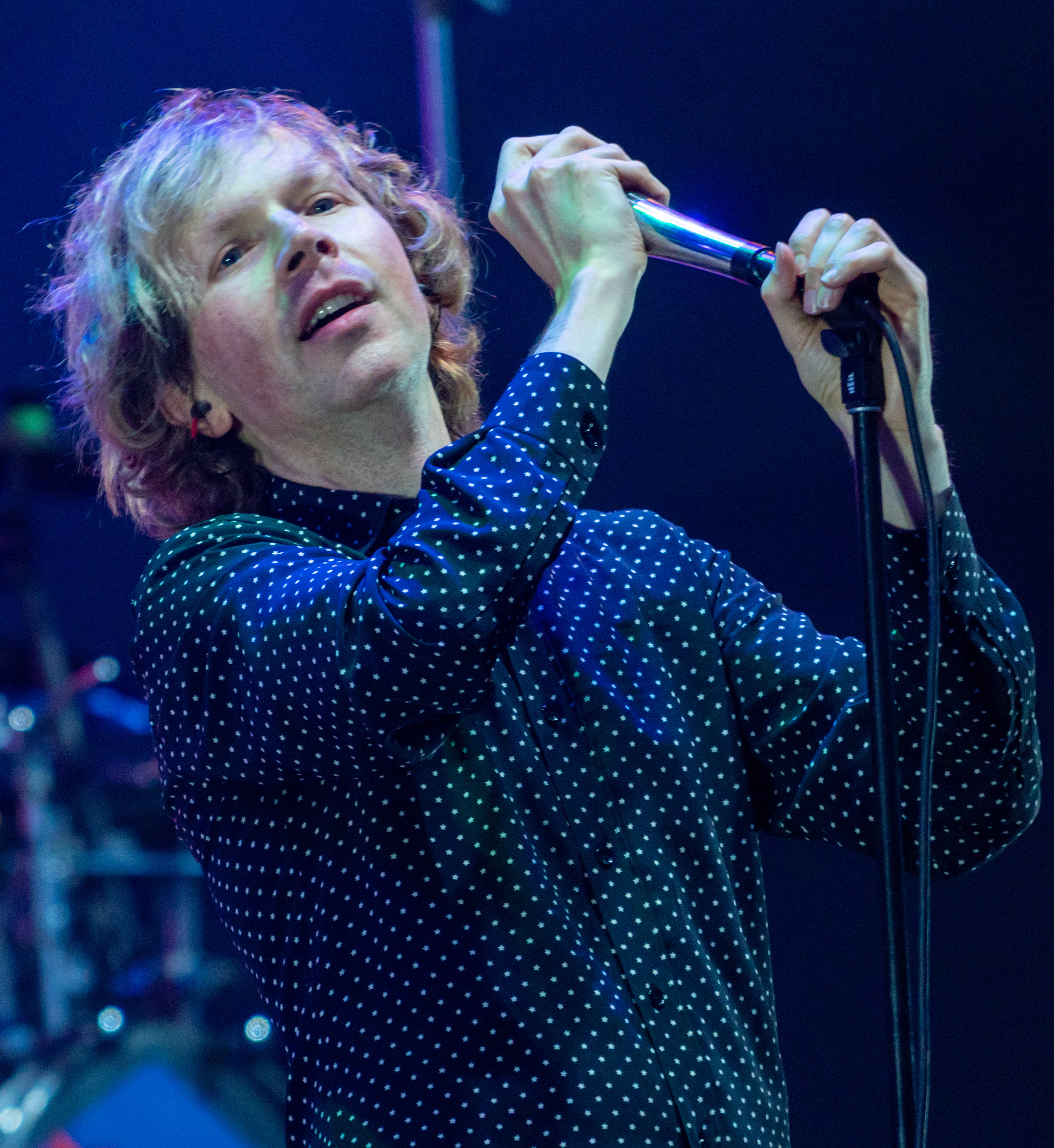 APEVicPark270518-93